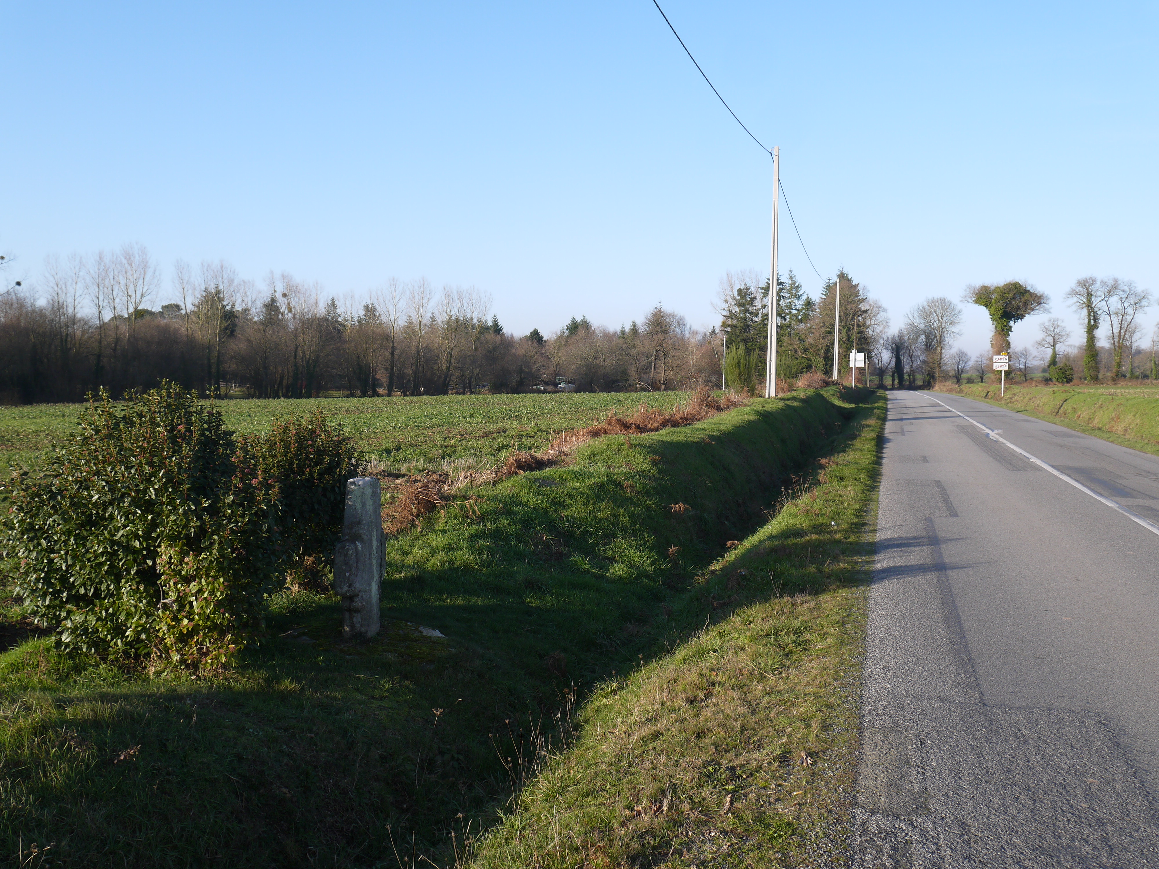 Vue d'ensemble sur la RD 21.